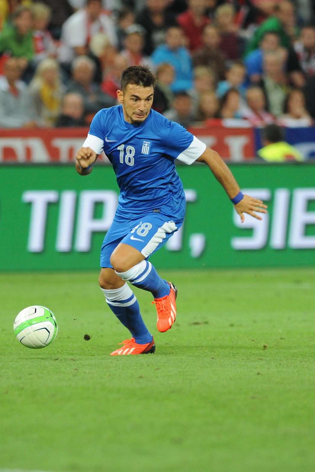 Freundschaftliches Länderspiel Österreich - Griechenland am 14. August 2013 in Salzburg: Sotiris Ninis